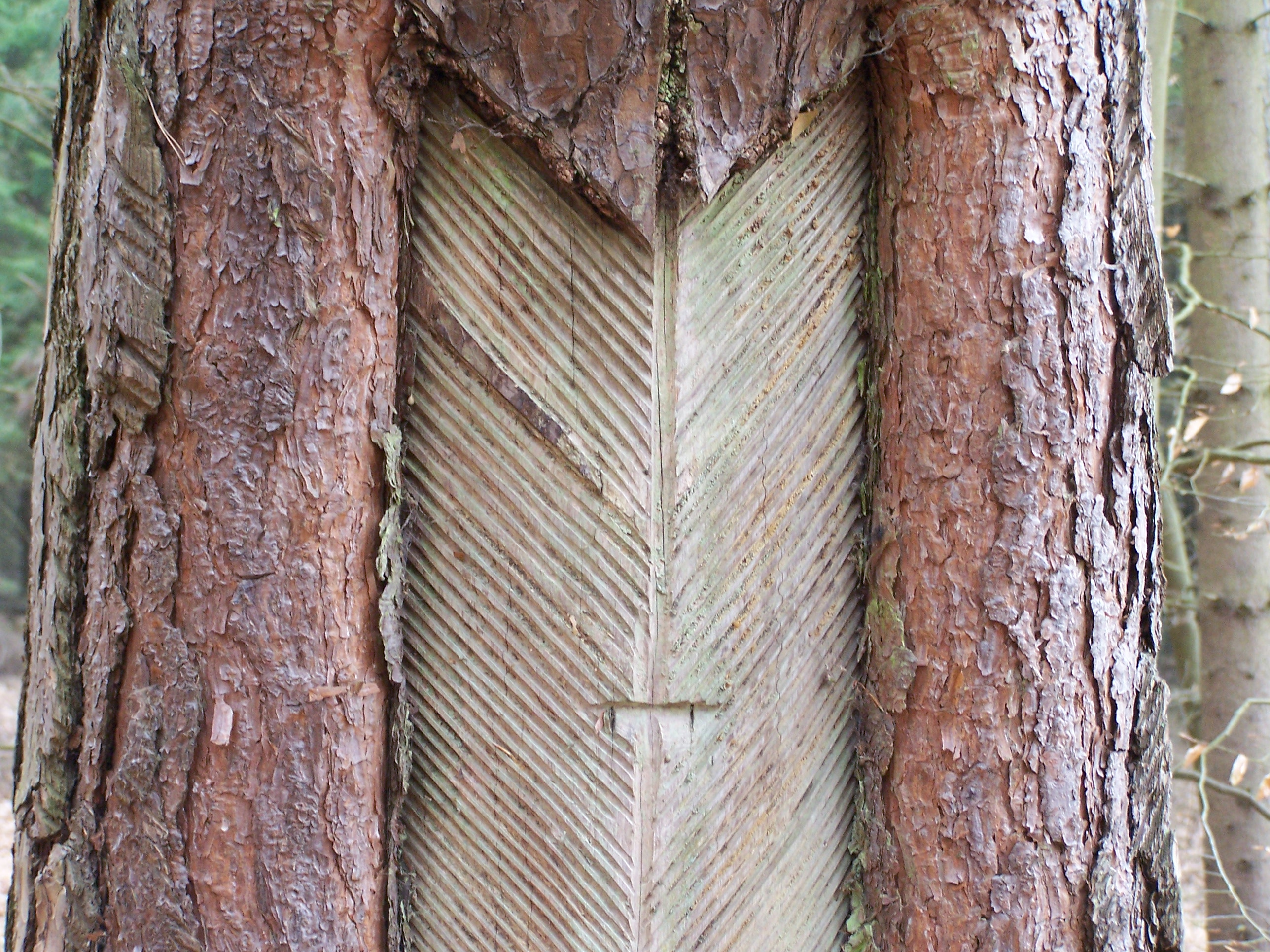 Sammeln von Baumharz